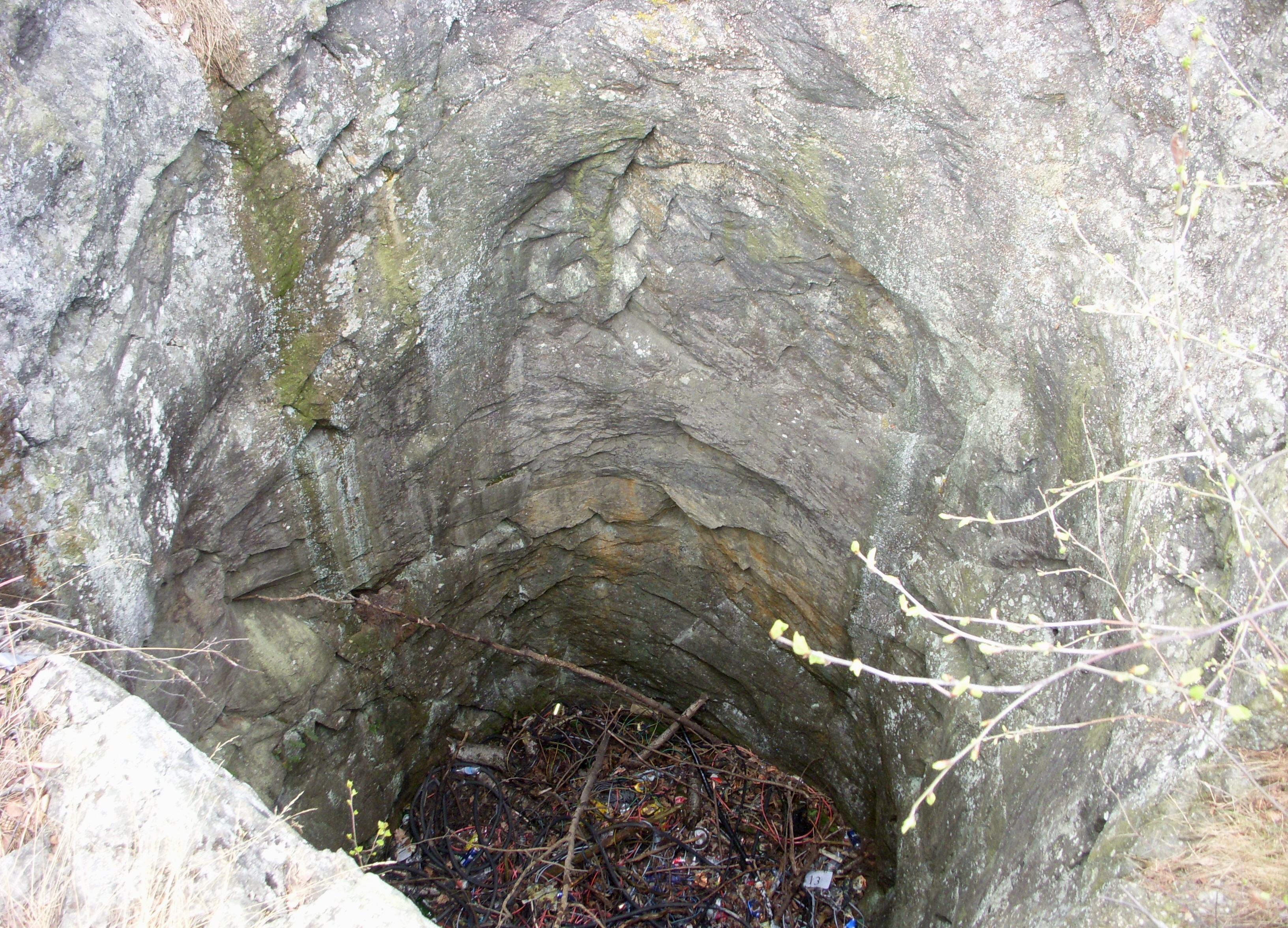 Det vertikala schaktet till vattenuppfordringsverket på grottberget i Hagaparken